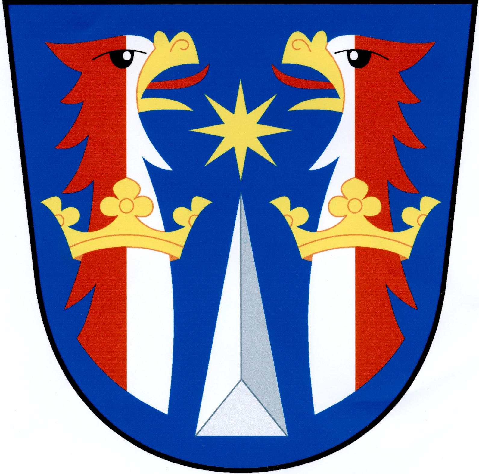 Znak obce Číhaň